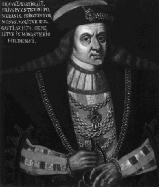 Eryk II wołogoski na portrecie w galerii książąt pomorskich w Anklam